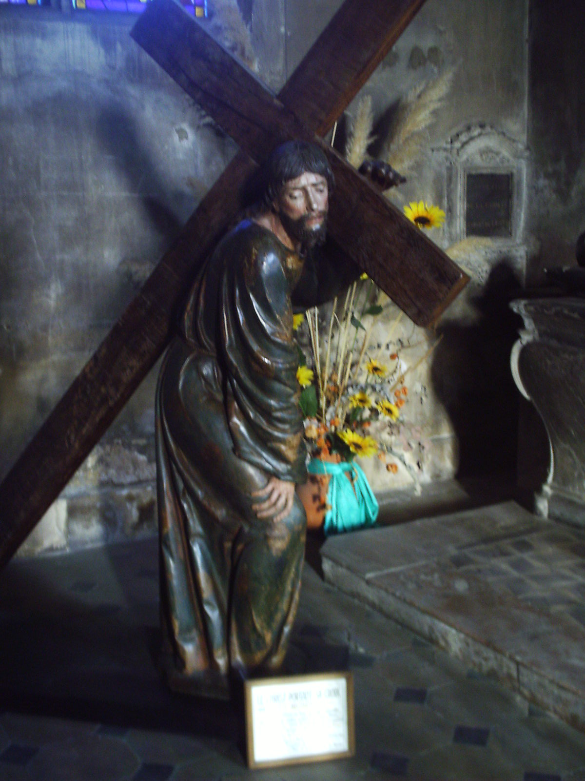 Le Christ portant la croix, Ligier Richier, Pont à Mousson